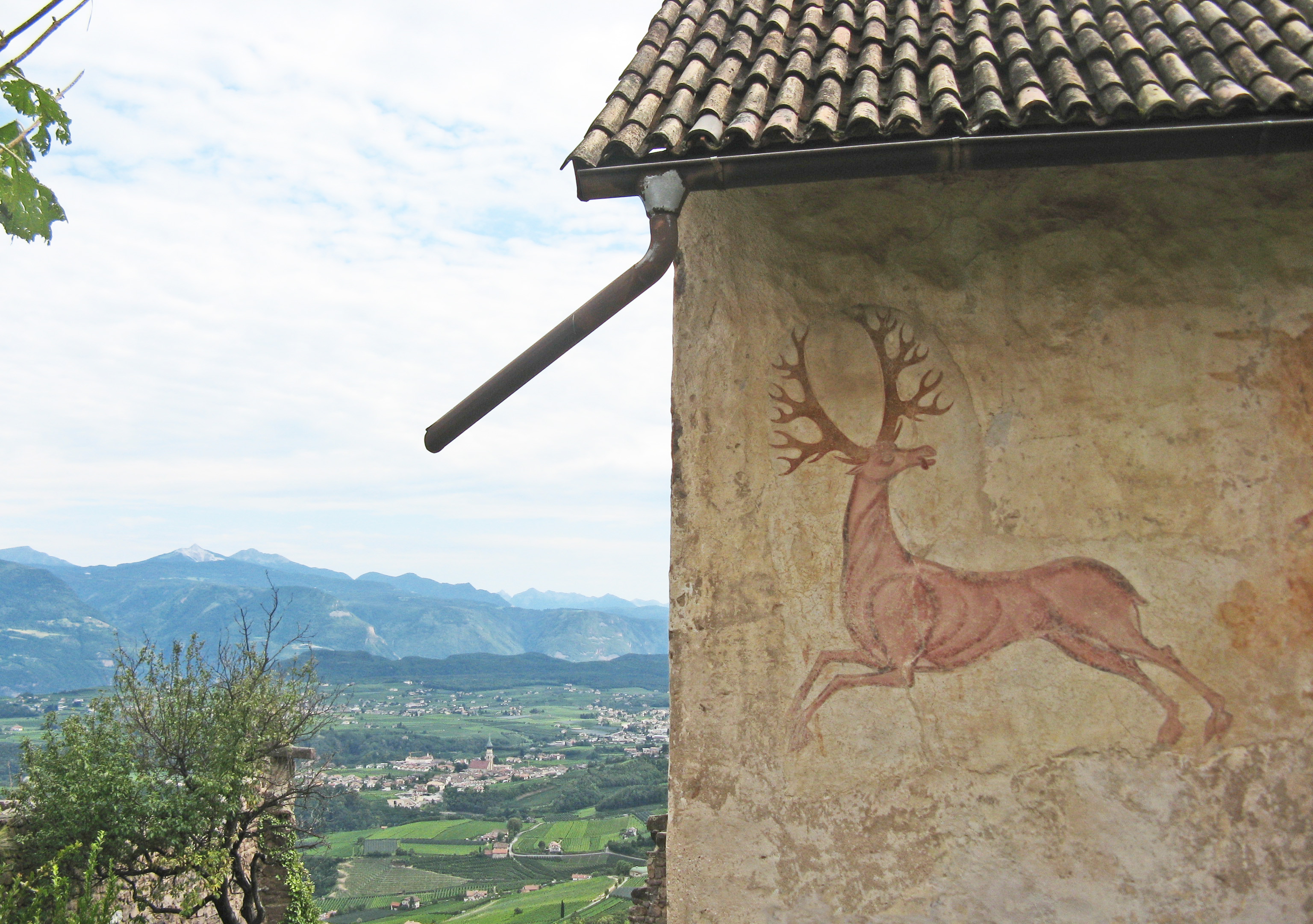 Romanisches Fresko eines springenden Hirsches an der Nordwand der Burgkapelle Hocheppan